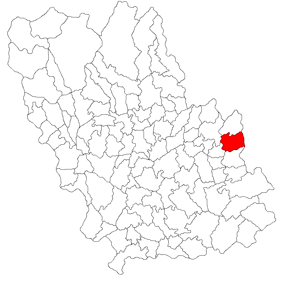 Categorie:Hărţi ale judeţului Prahova